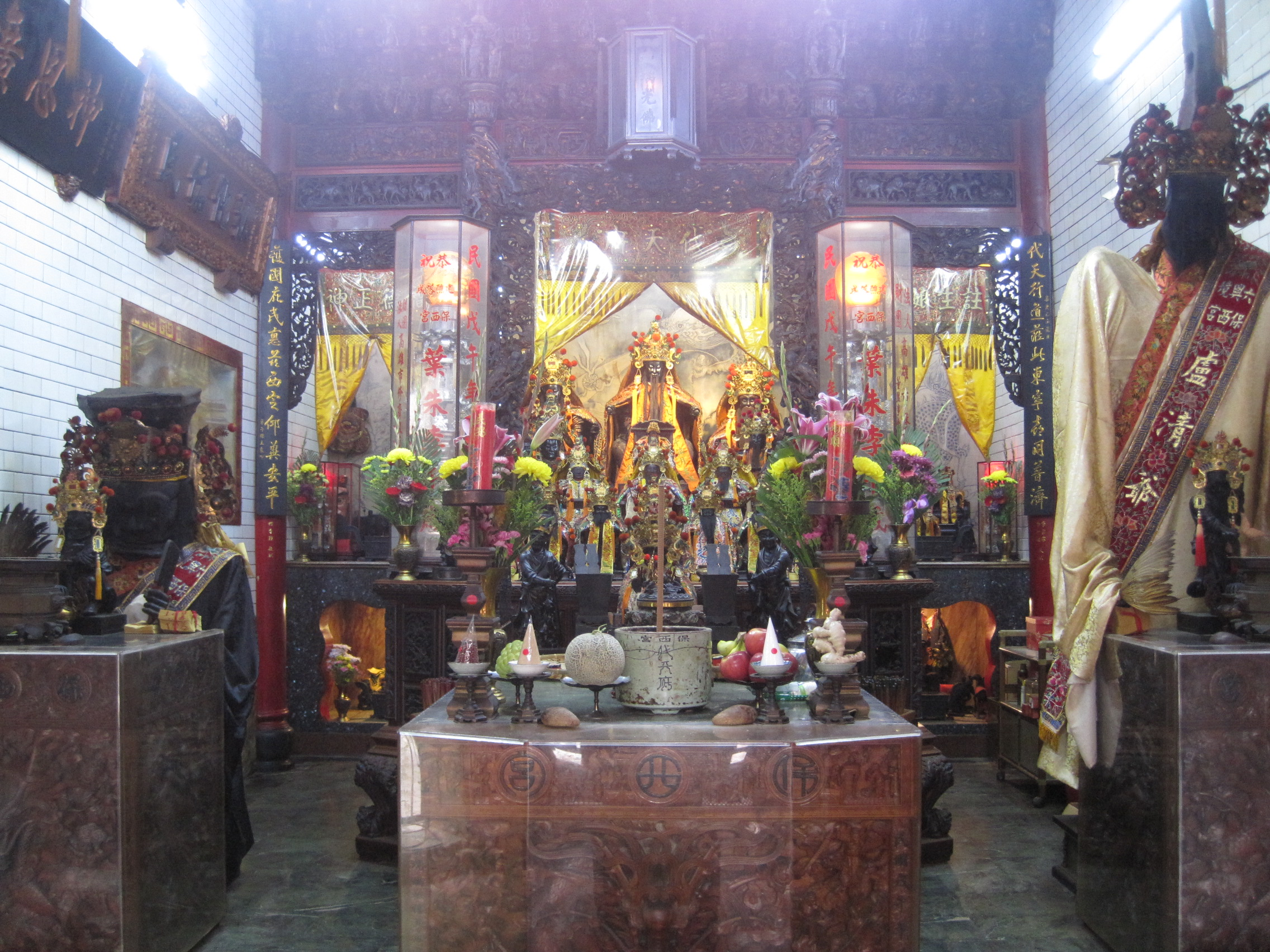 六興境保西宮正殿